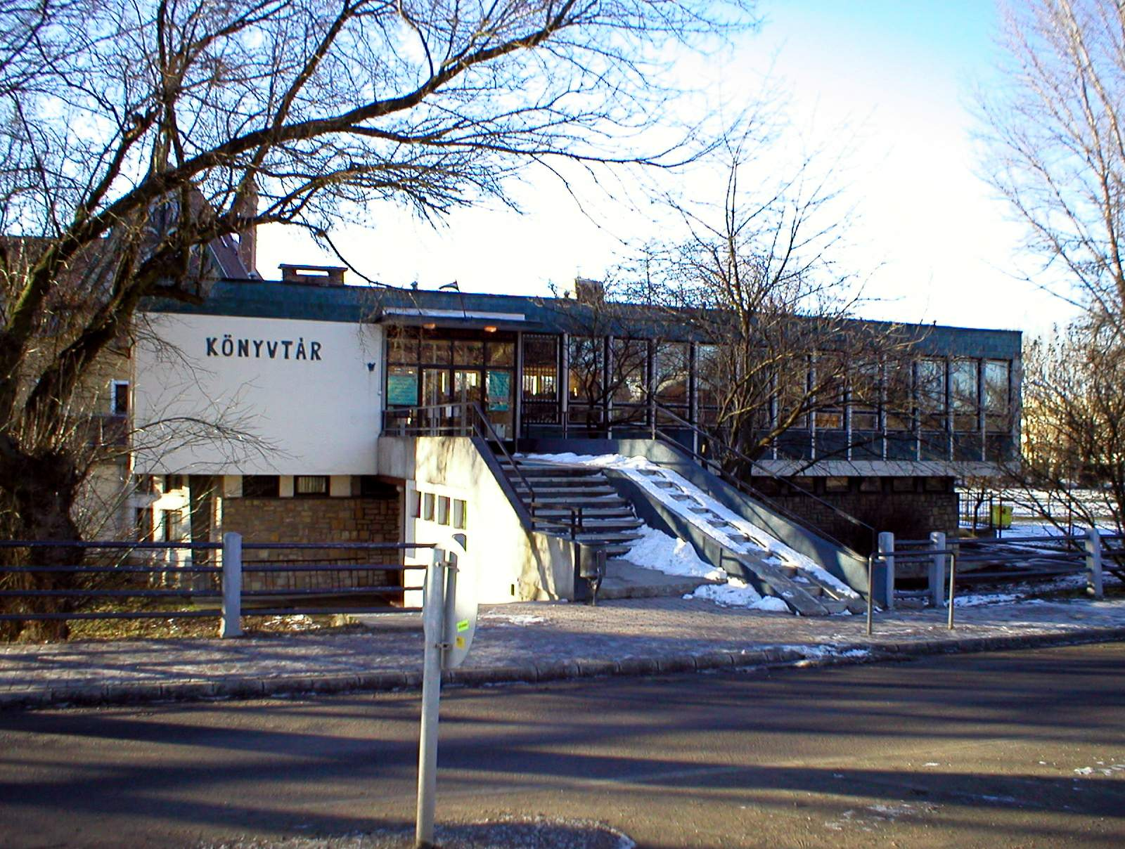 A Babits Mihály (később Helischer József) Városi Könyvtár épülete a Táncsics utcában.